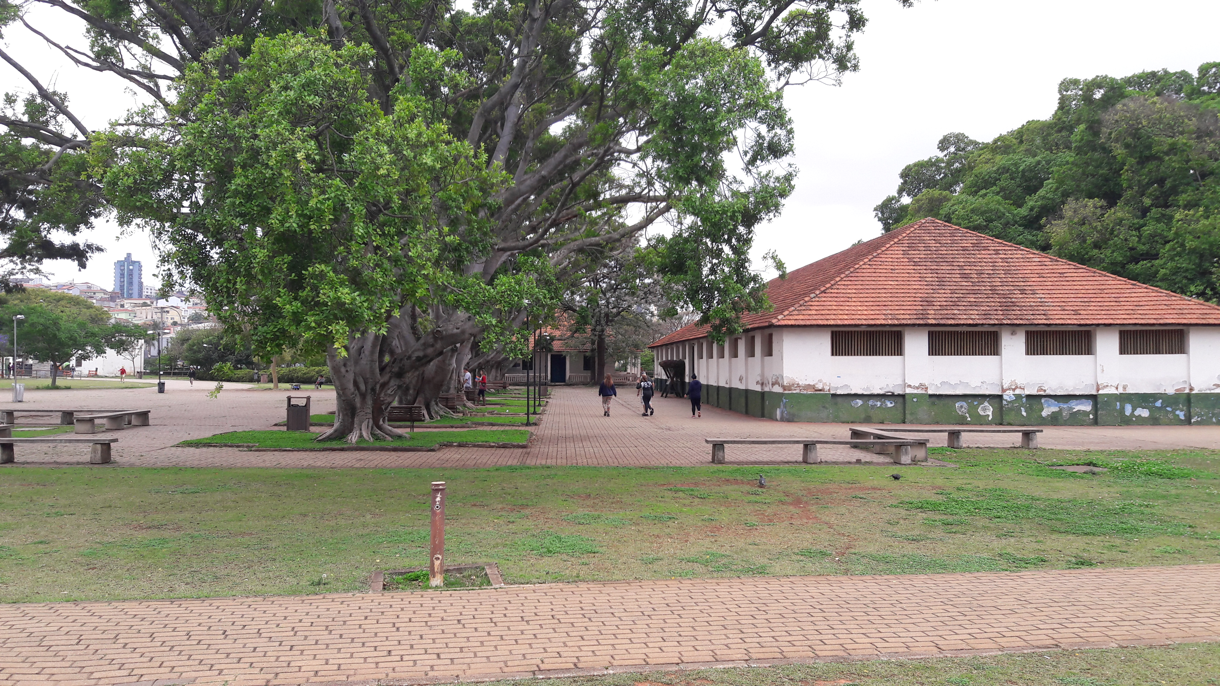 Outro ângulo de um dos casarões do parque do trote na Vila Guilherme, em São Paulo (SP), Brasil.